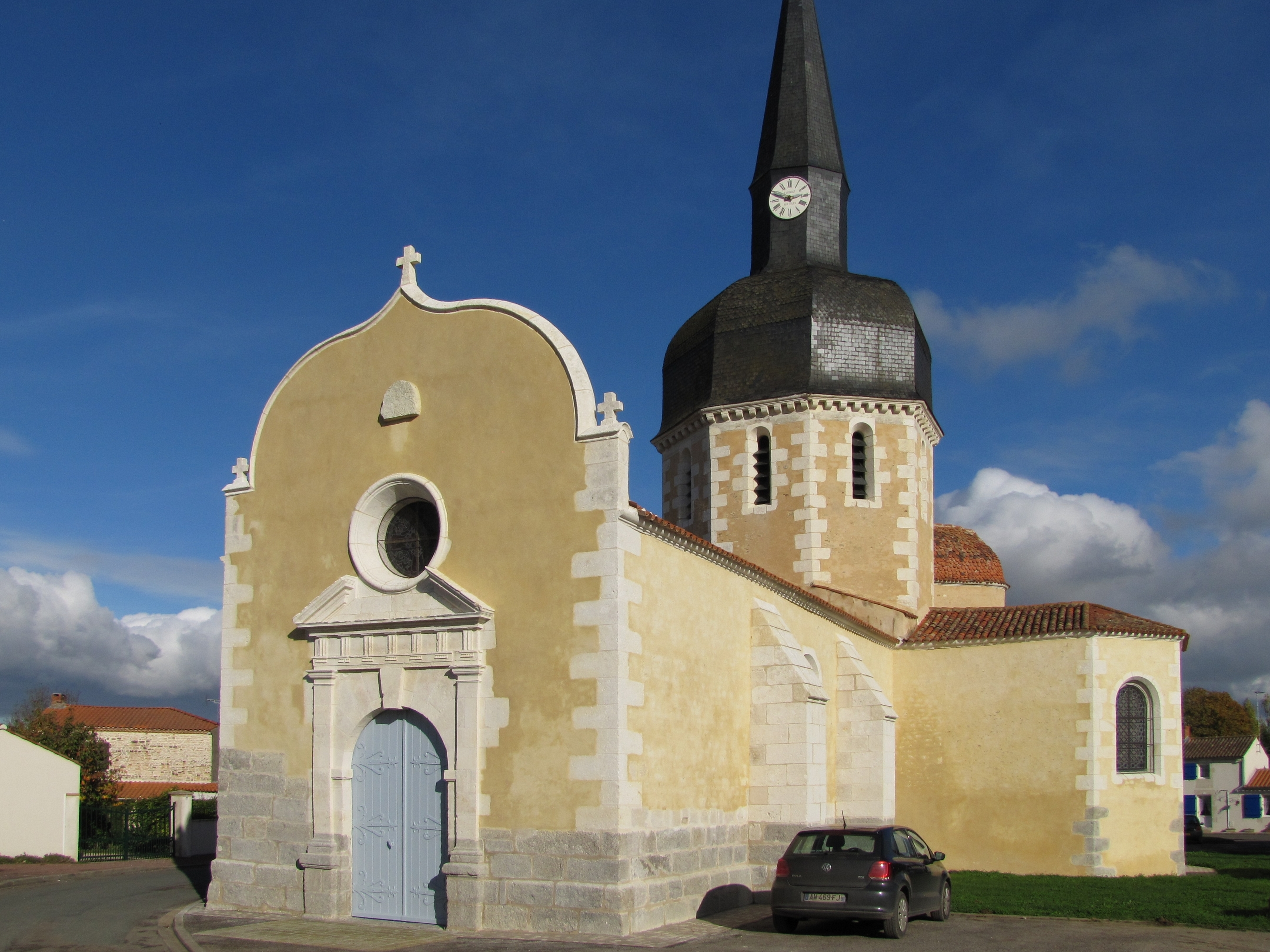 Église Saint-Martin de La Jonchère